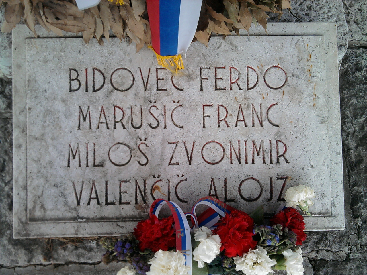 Spomenik bazoviškim žrtvam (Ferdo Bidovec, Fran Marušič, Zvonimir Miloš in Alojzij Valenčič)